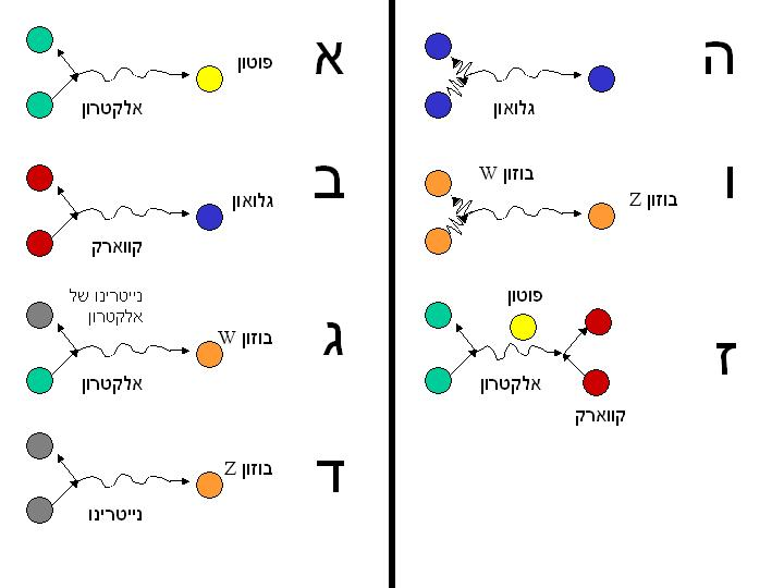 המודל הסטנדרטי